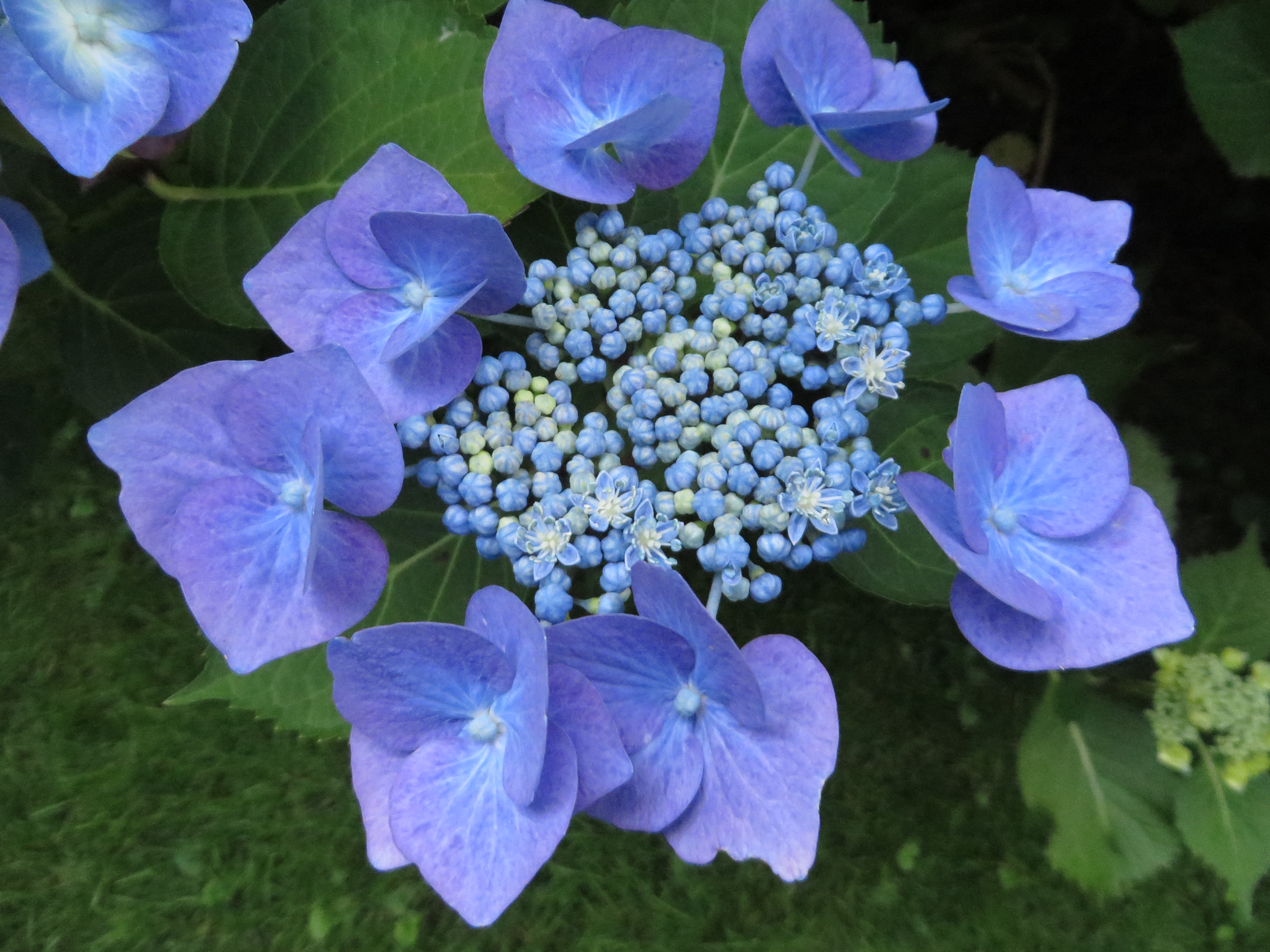 Tellerhortensie